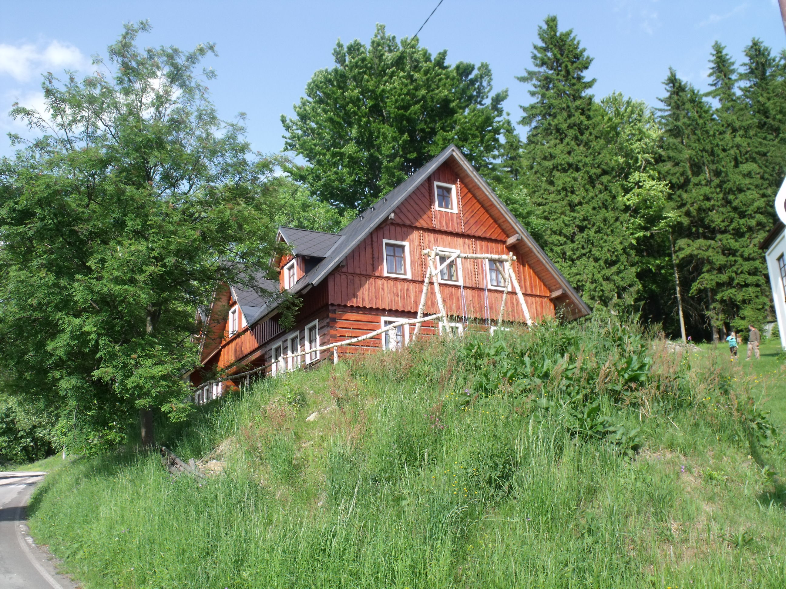 Moderní roubená budova na Benecku. Stylem a stavebními napodobuje původní krkonošskou architekturu, charakteristickou roubením s podélně pokládaných trámů, utěsněných ve spáře dříve směsí plev a vápna, nyní již moderními materiály. Objekt je využíván k rodinné rekreaci.